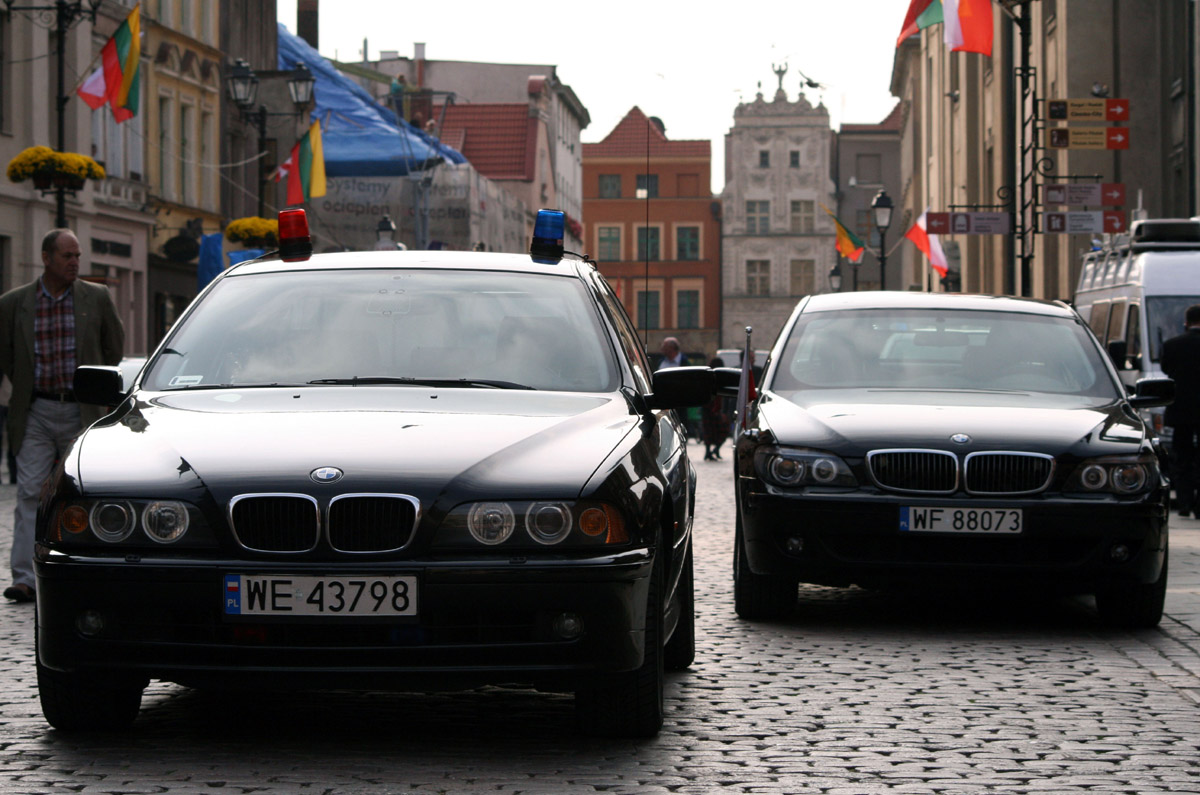 BMWs of Biuro Ochrony Rządu. Toruń, Rynek Staromiejski.